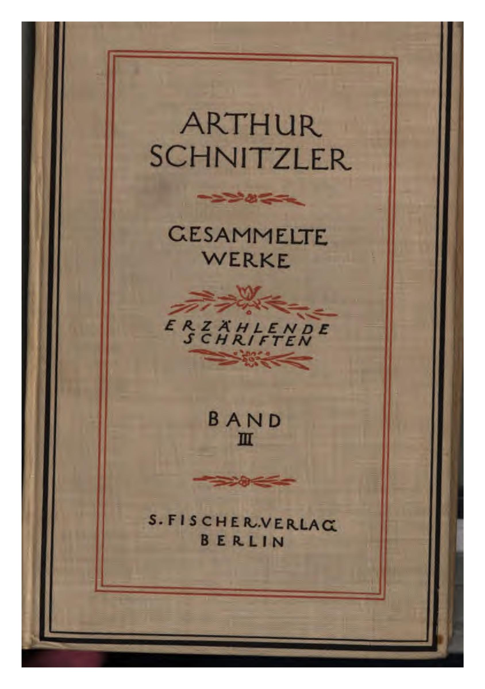 This is a scan of the historical document: Gesammelte Werke Erzählende Schriften Band III